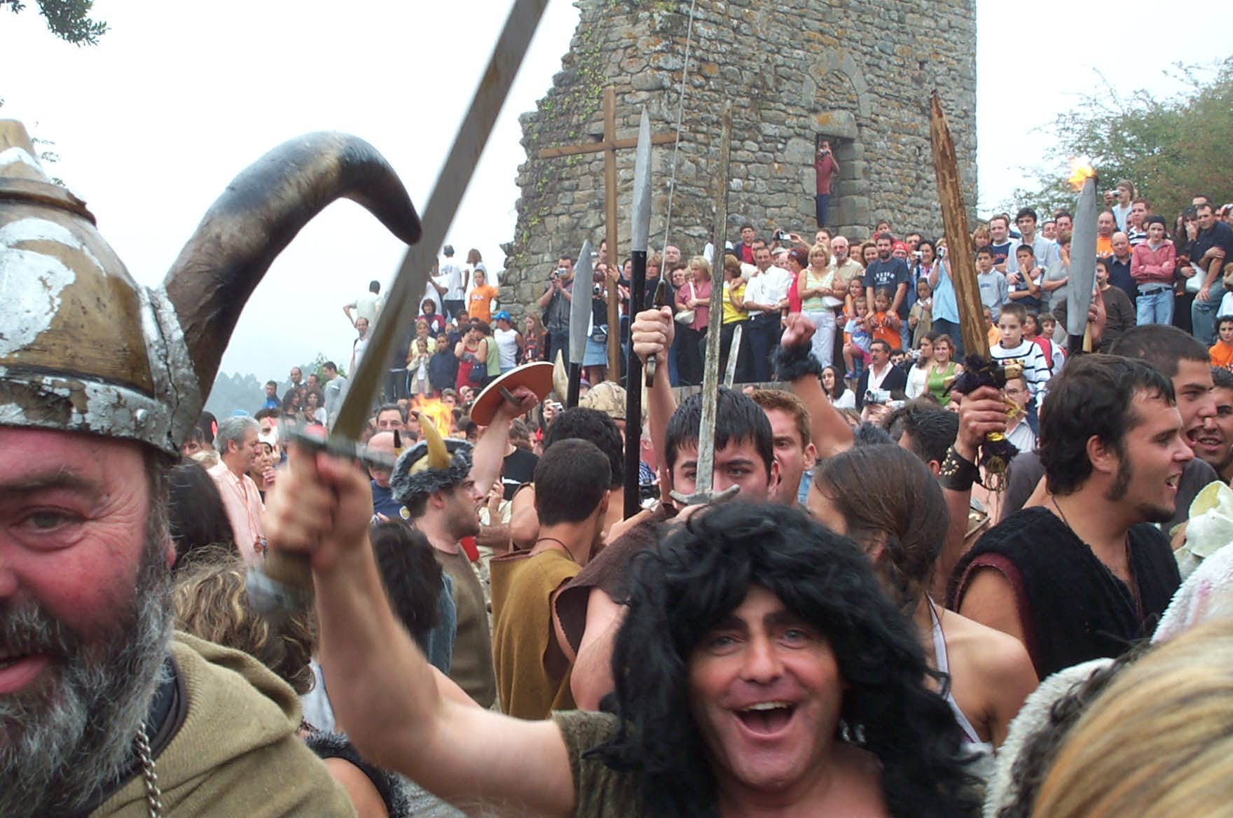 Foto tomada en la popular fiesta de los Vikingos o Romeria vikinga en Catoira La Romería Vikinga de Catoira es una Fiesta de Interés Turístico Internacional que se celebra en Catoira, Pontevedra, Galicia, España. La fiesta se celebra el primer domingo de agosto. La principal atracción de la Romeria es el desembarco vikingo que suele ser entre las 12 y las 14, miles personan acuden para ver desembarcar a los vikingos, que llegan en un Drakar o barco vikingo simulando la invasión o ataque vikingo.